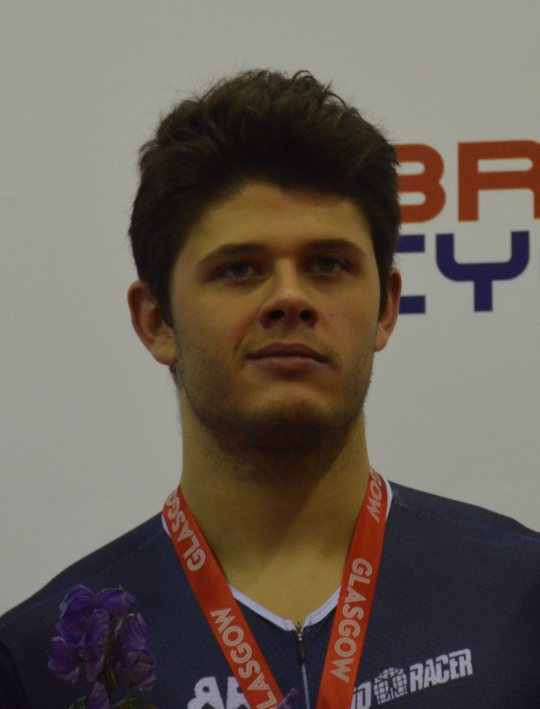 Quentin Lafargue, französischer Radsportler